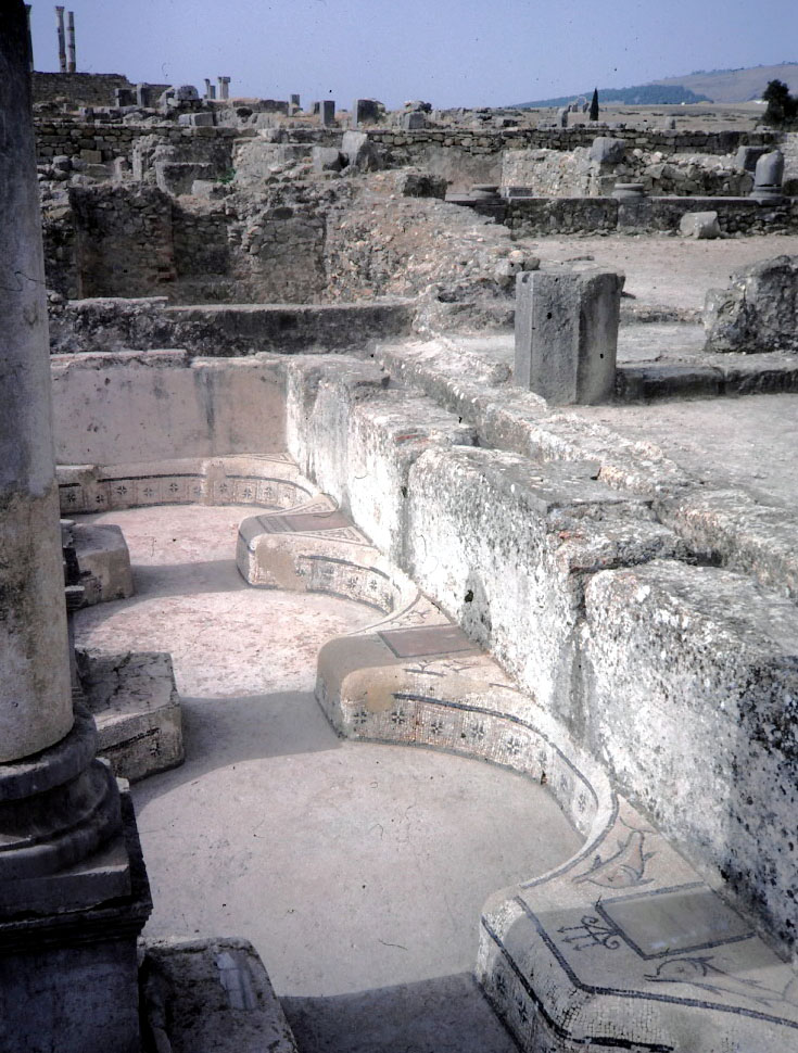 Volubilis (Walili), au Maroc. Mosaïque dans des bassins.